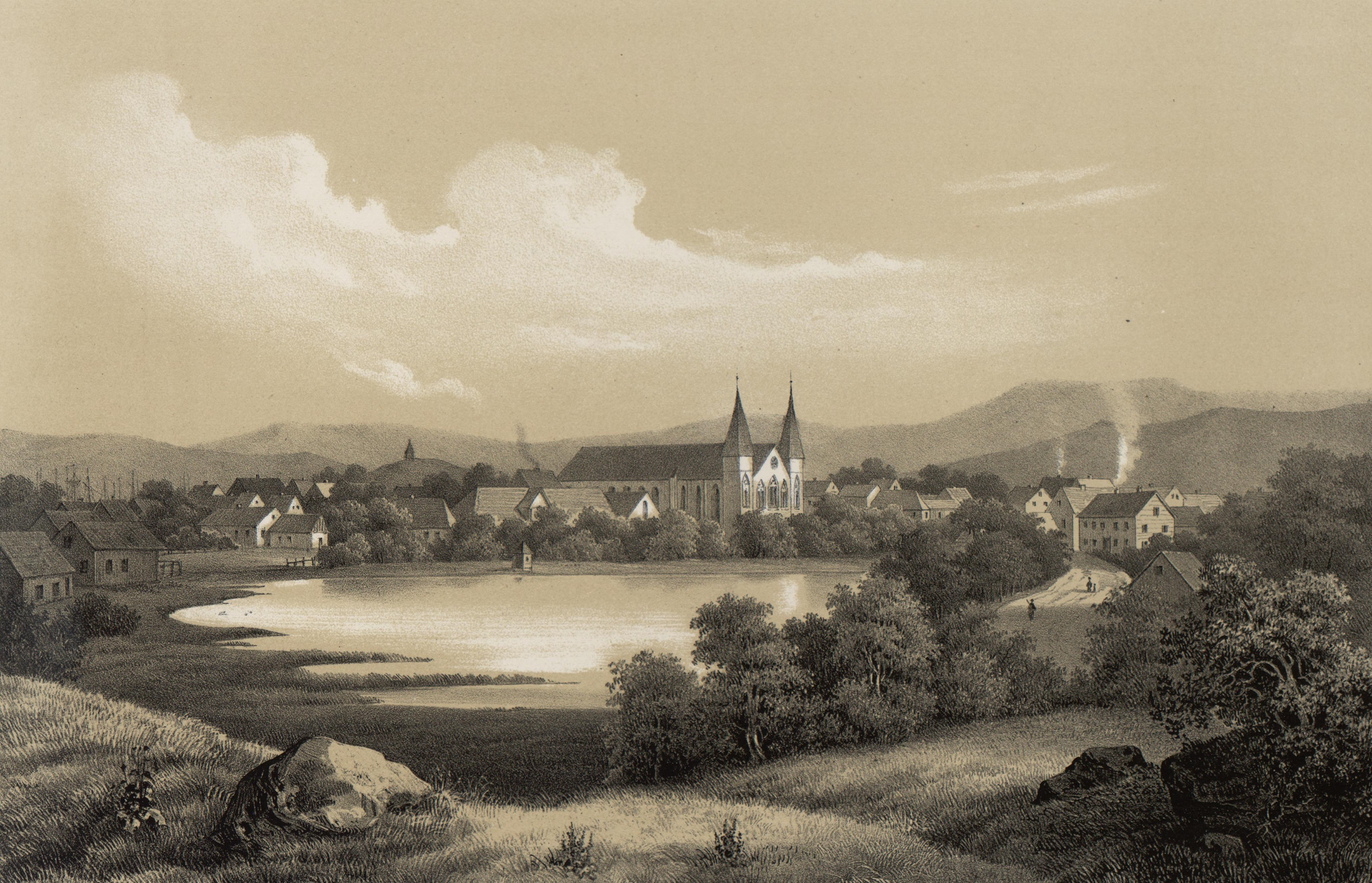 Illustrasjon hentet fra boken "Norge fremstillet i Tegninger" av Asbjørnsen, P.Chr. og utgitt av Chr. Tønsberg (no, 1848)